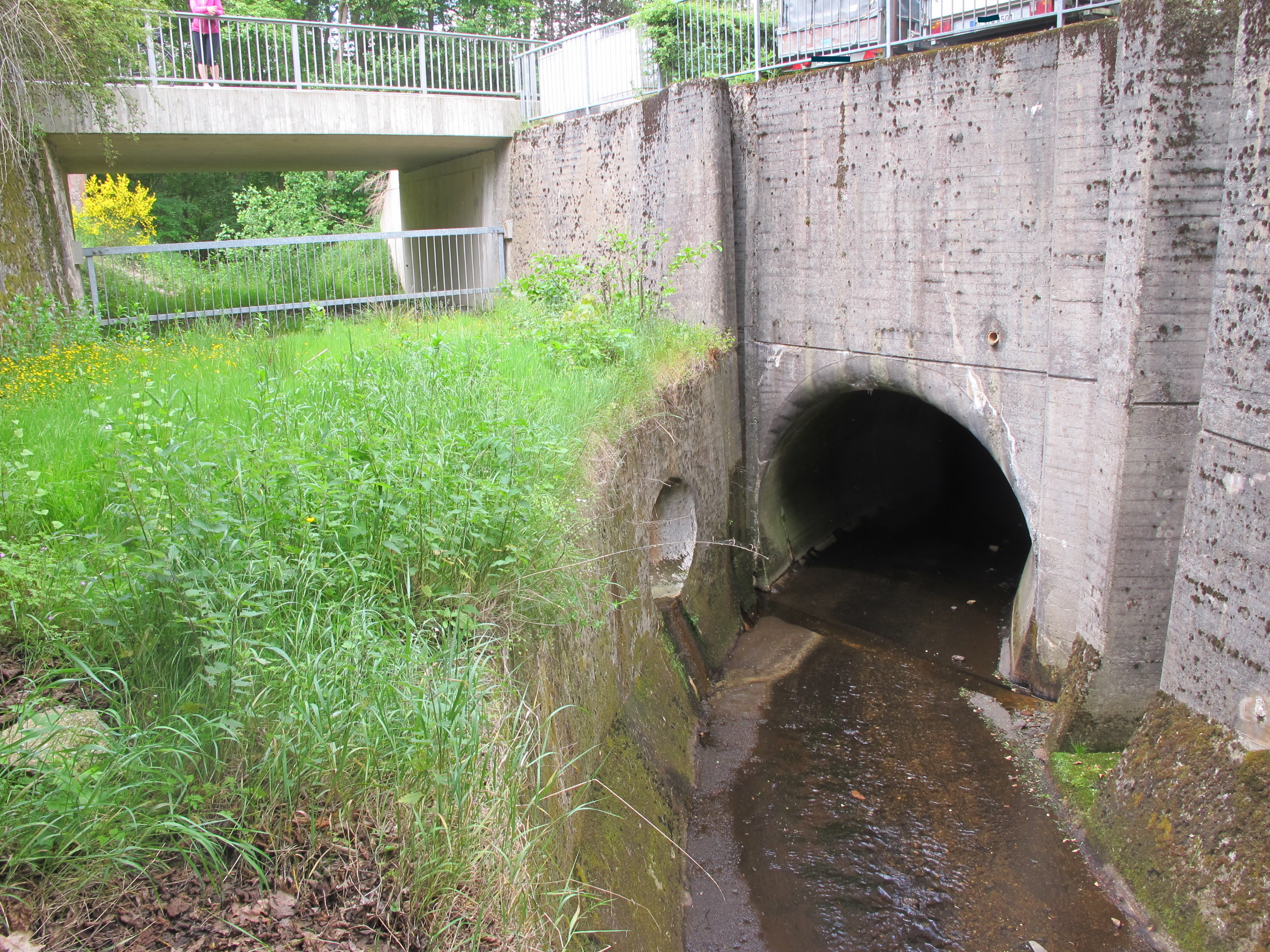 Roetgen, Mühlenstraße: Ableitung des verunreinigten Wassers des Weserbaches, durch einen Stollen in den Grölisbach, zur Reinhaltung des Trinkwassers in der Wesertalsperre bei Eupen.